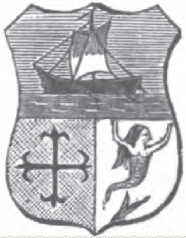 BARCELÓ. "Otra rama de este noble linaje tiene su solar en Tarragona, y usa por armas un escudo partido en faja: en el 1.er cuartel en campo azur una barca de oro con sus remos, puestos sobreondas de mar azures y plata, y el 2.° partido en pal; à la derecha en campo de oro una cruz de gules floreteada, y à la siniestra en campo de oro una cruz de gules floreteada, y à la la siniestra en campo de plata una sirena de gules; y debajo de ella unos troncos con ramas sinoples". Don Juan José Vilar Psayla cronista y rey de armas de S.M. católica la reina doña Isabel II (Madrid, 1867), Linajes nobles de España: catálogo de todos los apellidos y escudos de armas que a cada uno pertenecen, p.173